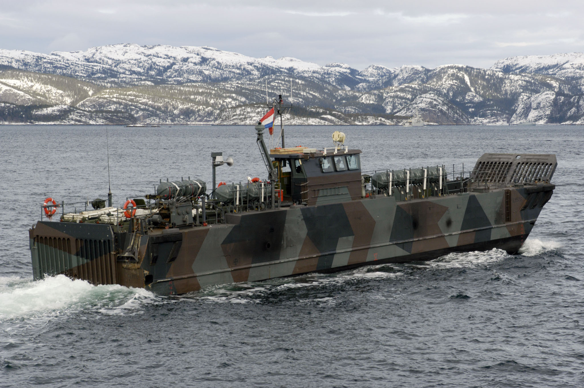 Deze foto is zelfgemaakt en eigedom van mezelf.....iedereen mag deze foto gebruiken